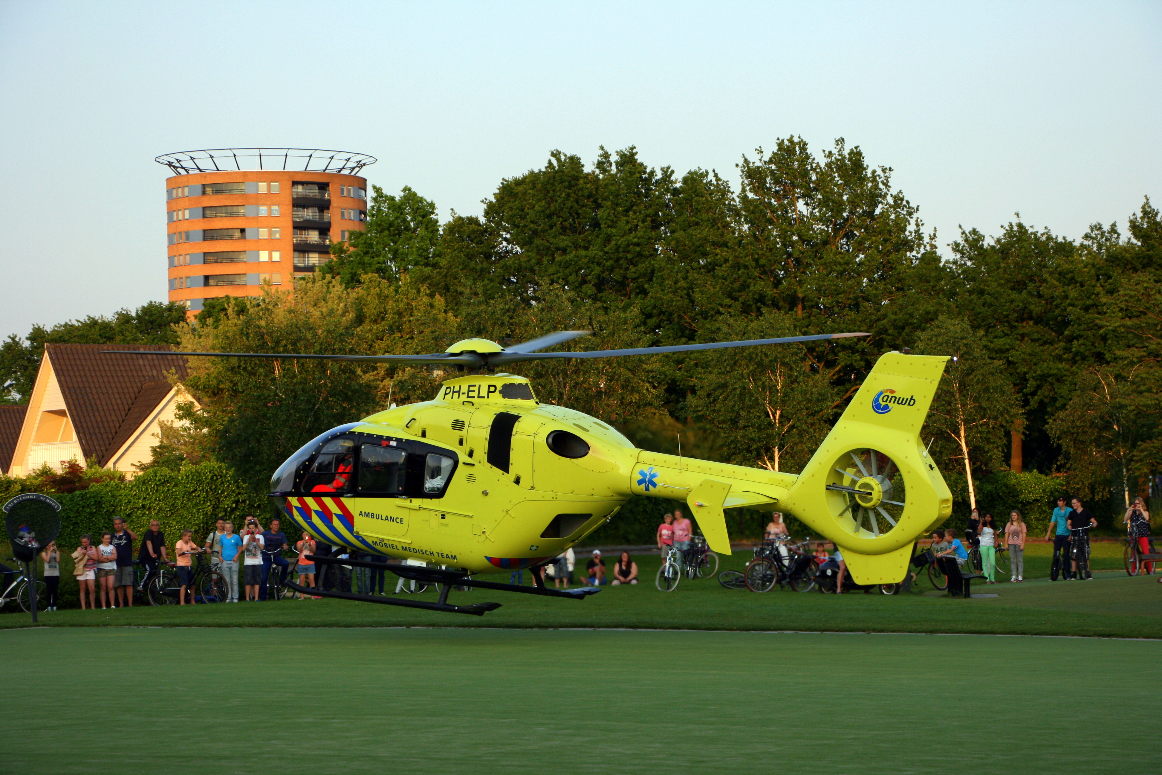 ANWB Lifeliner 1 (Eurocopter EC-135) tijdens inzet in Amersfoort Nieuwland. Geland op voetbalveld bij de Draak aan de Zeldertsedreef. Weet niet wat de aanleiding was voor het bezoek.